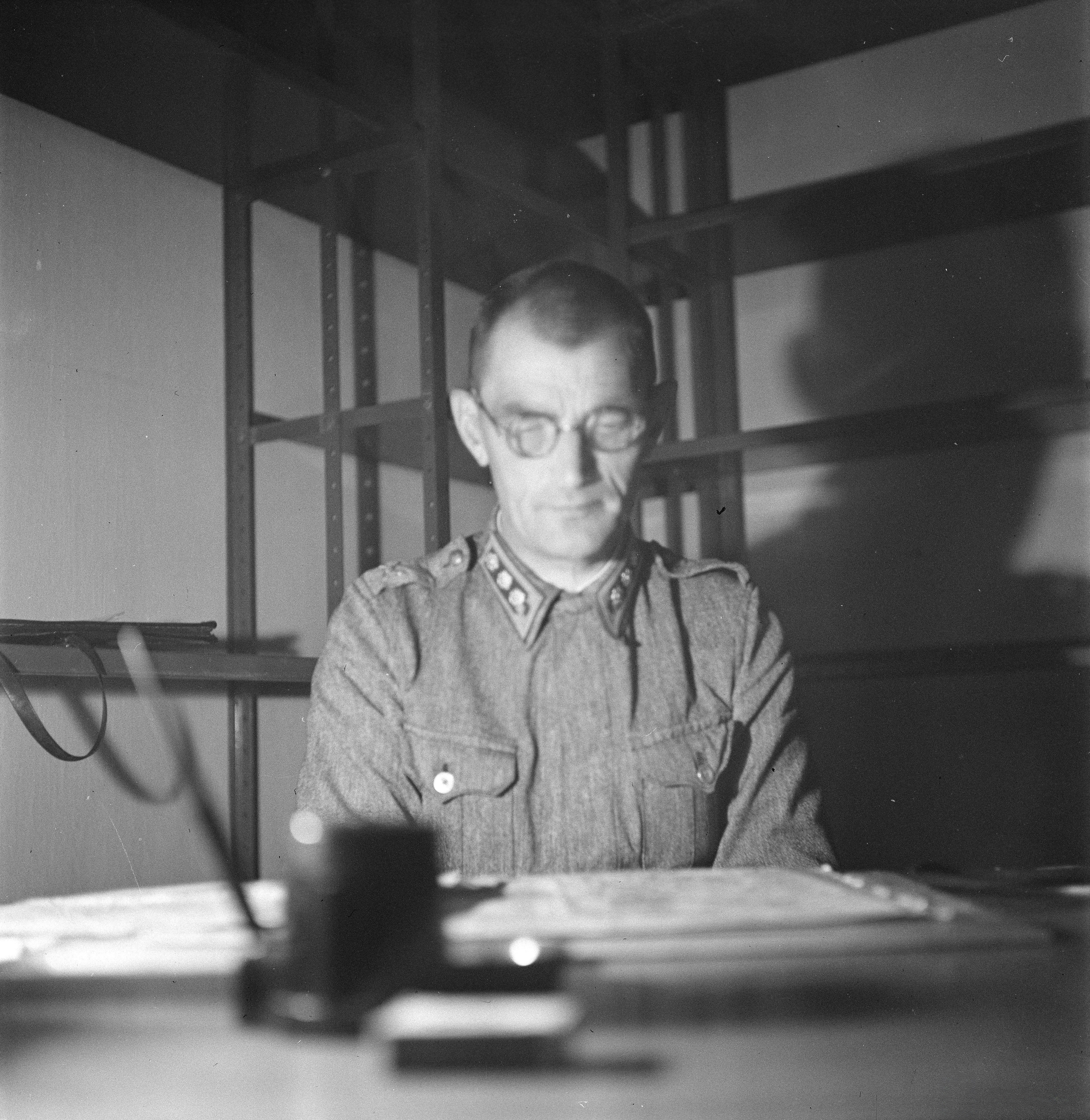 Eversti Armas Kemppi komentopaikallaan Viipurissa Pohjoismaiden Yhdyspankin holvissa 20. kesäkuuta 1944.